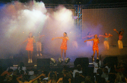 Optreden van K3 zomer 2001 in Oostende België